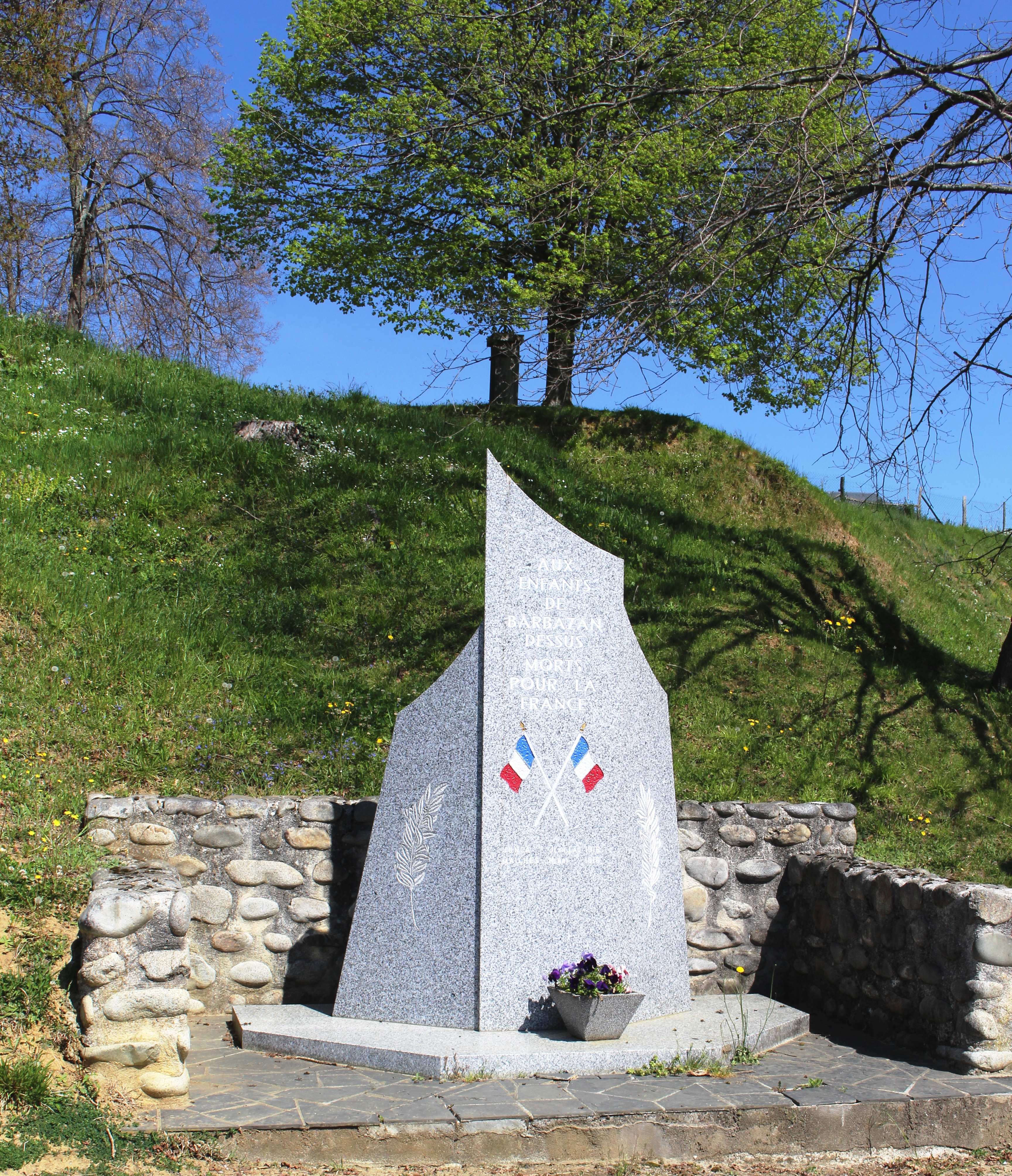 Monument aux morts de Barbazan-Dessus (Hautes-Pyrénées)